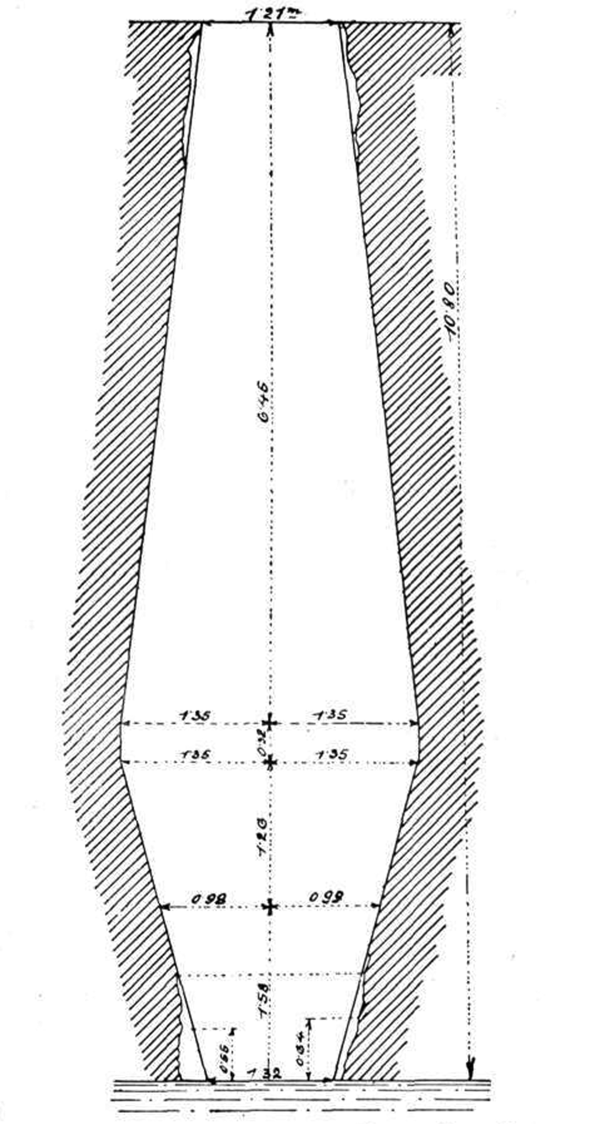 A Govasdiai (Ó-Limperti) nagyolvasztó kibélelési terve az 1849-iki évadra, az üzembehozatal előtt és kifúvás után.